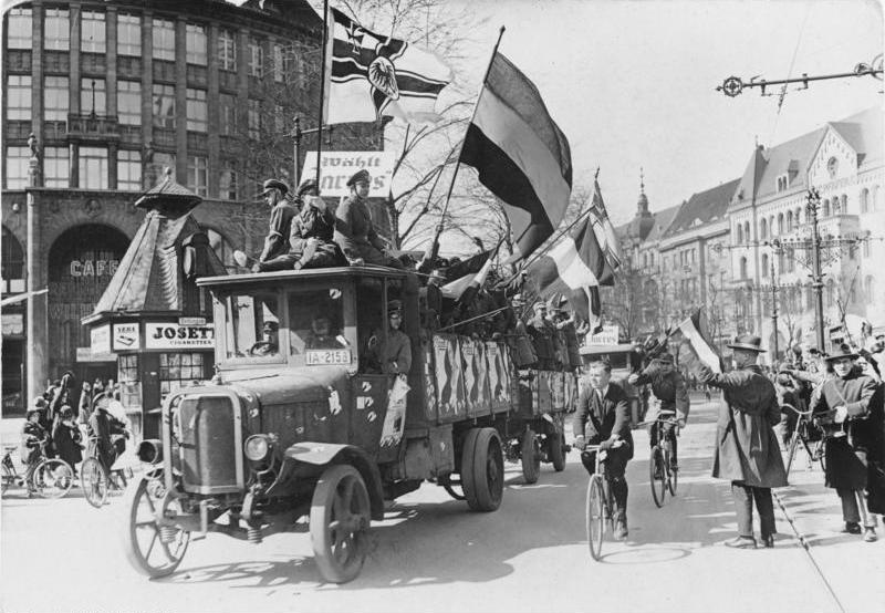 Die Wahlschlacht für die Reichspräsidentenwahl in Berlin fand unter dem Massenaufgebot sämtlicher Parteien statt. Ein mit Jungmannen vollbesetztes Lastauto beim Durchfahren der Straßen Berlins, um für die Kandidatur Jarres zu werben.